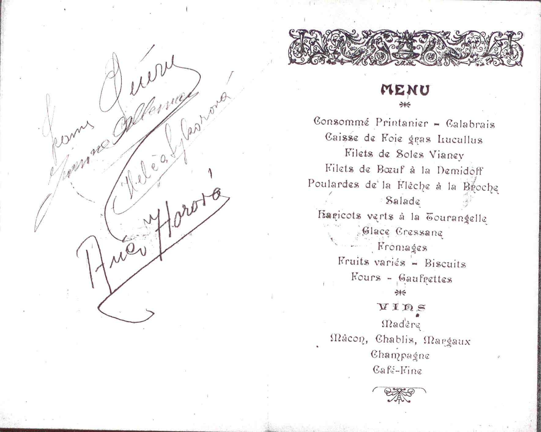 Menu du banquet de la Mi-Carême donné au Palais des Fêtes, Paris 23 mars 1911